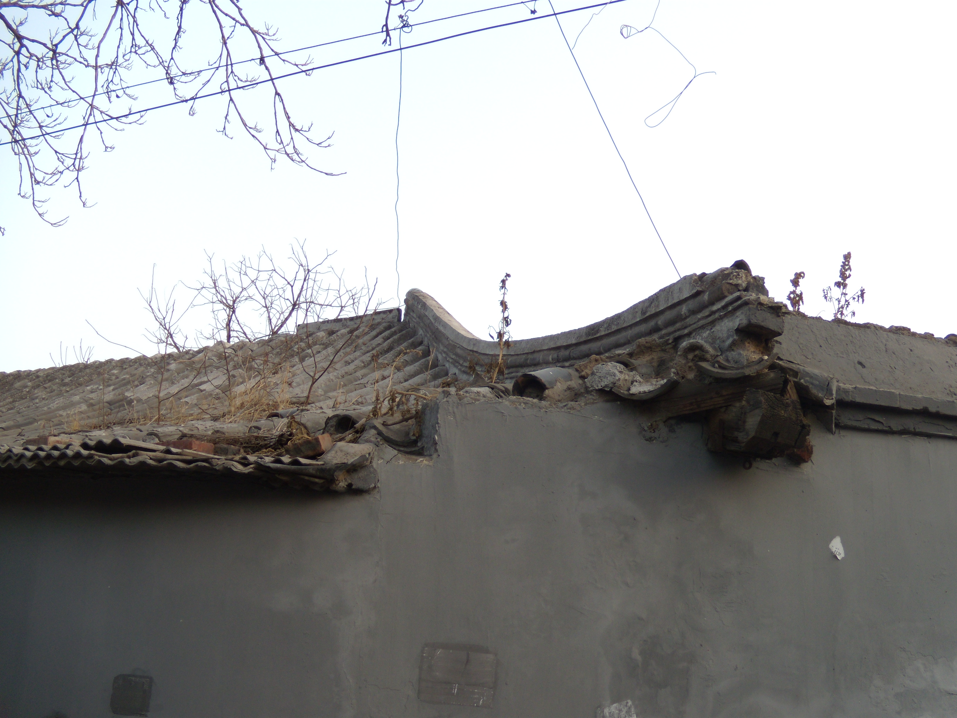 北京护国寺